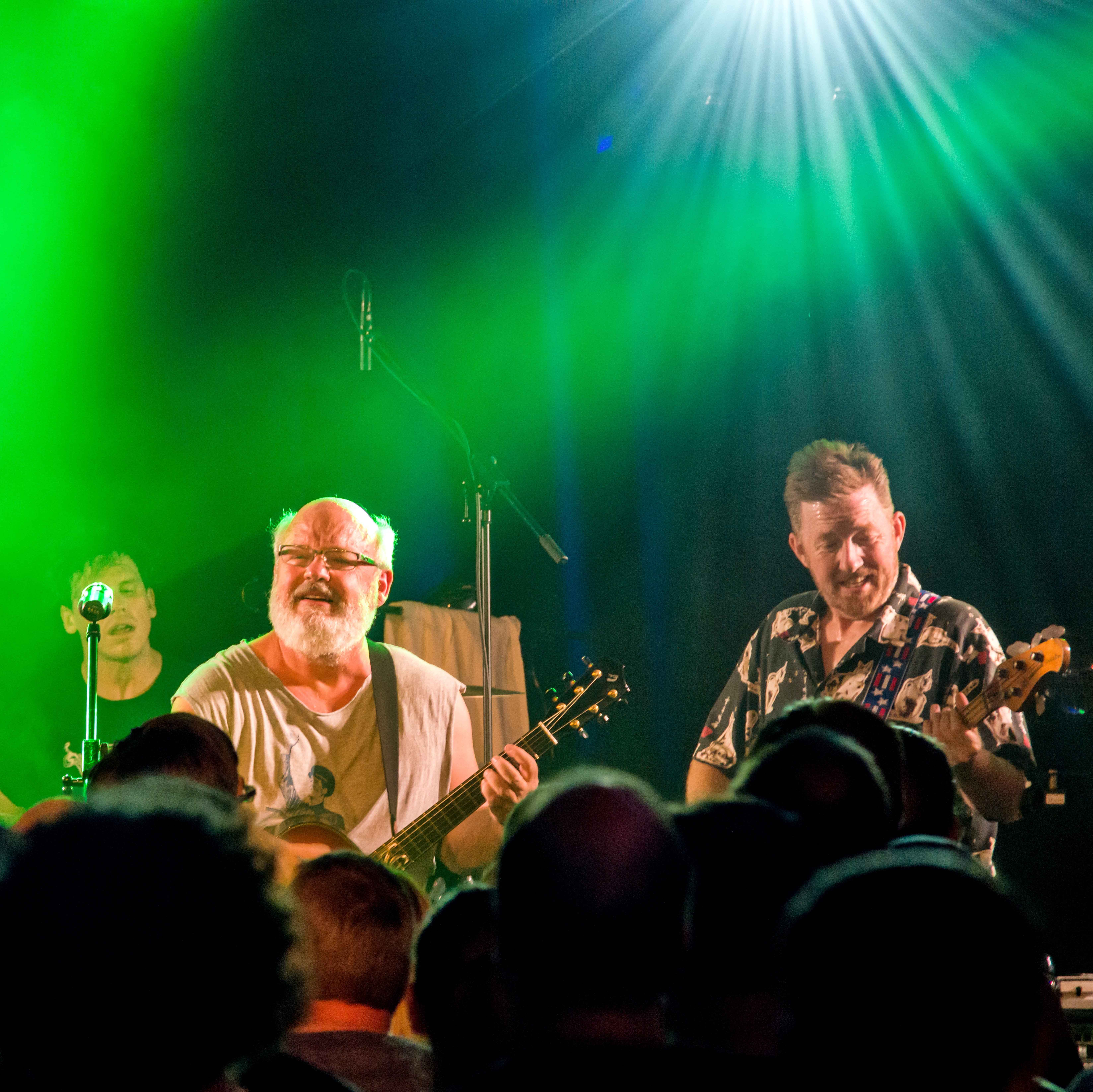 Bilder vom Zelt Musik Festival 2017 in Freiburg im Breisgau Kyle Gass Band